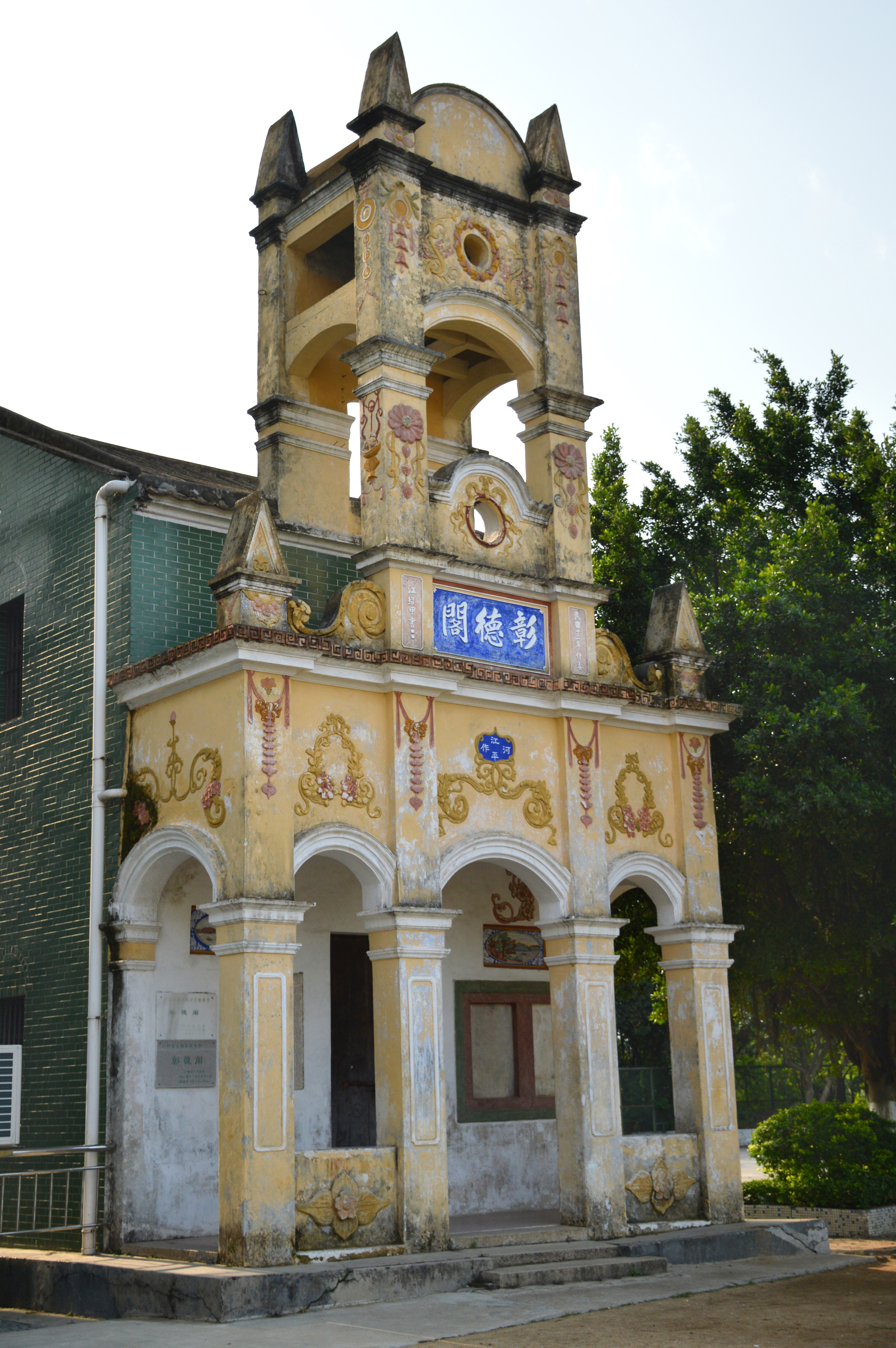 位于广东省广州市花山镇洛场村美成小学。建于1923年。为小学的钟楼。2005年9月20日公布为广州市登记保护文物单位，2008年12月29日公布为广州市文物保护单位。